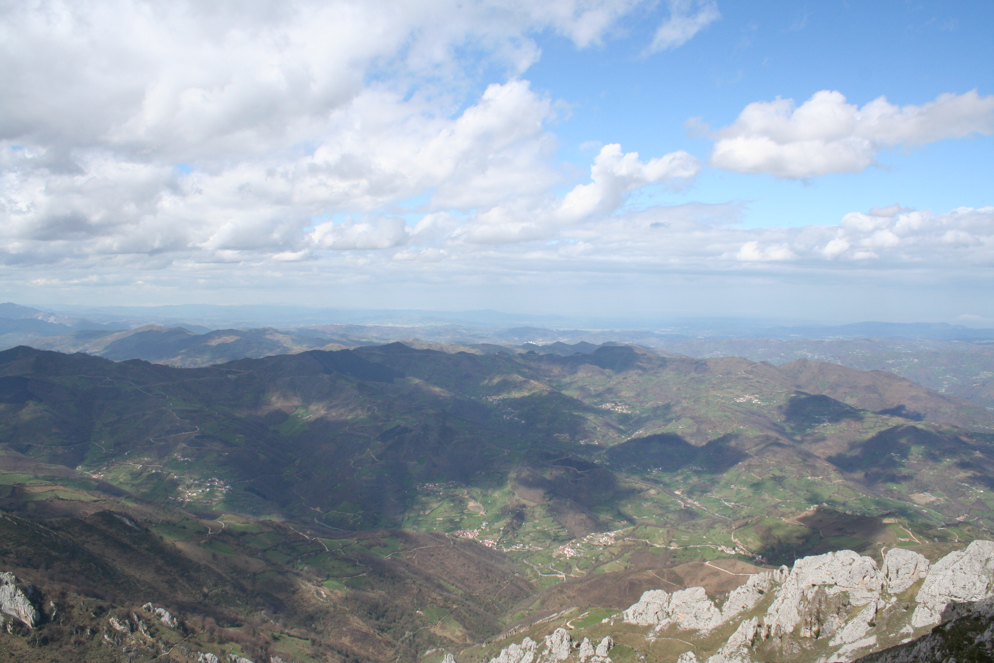 Vista del valle de Pola de Laviana desde el pico de Peña Mea en Asturias